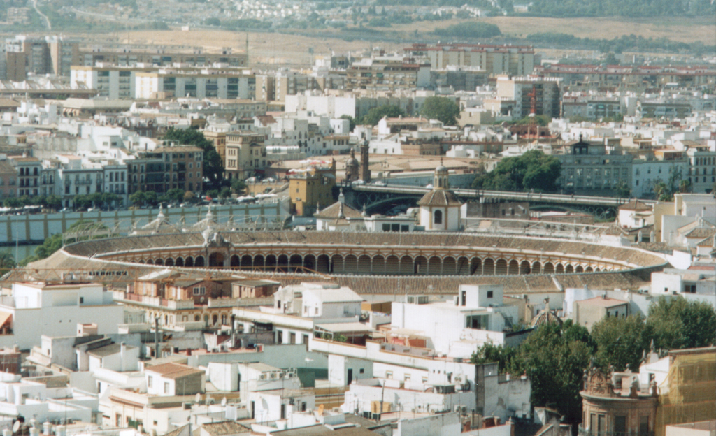 Plaza de toros de la Real Maestranza de Caballería de Sevilla as seen from the cathedral.